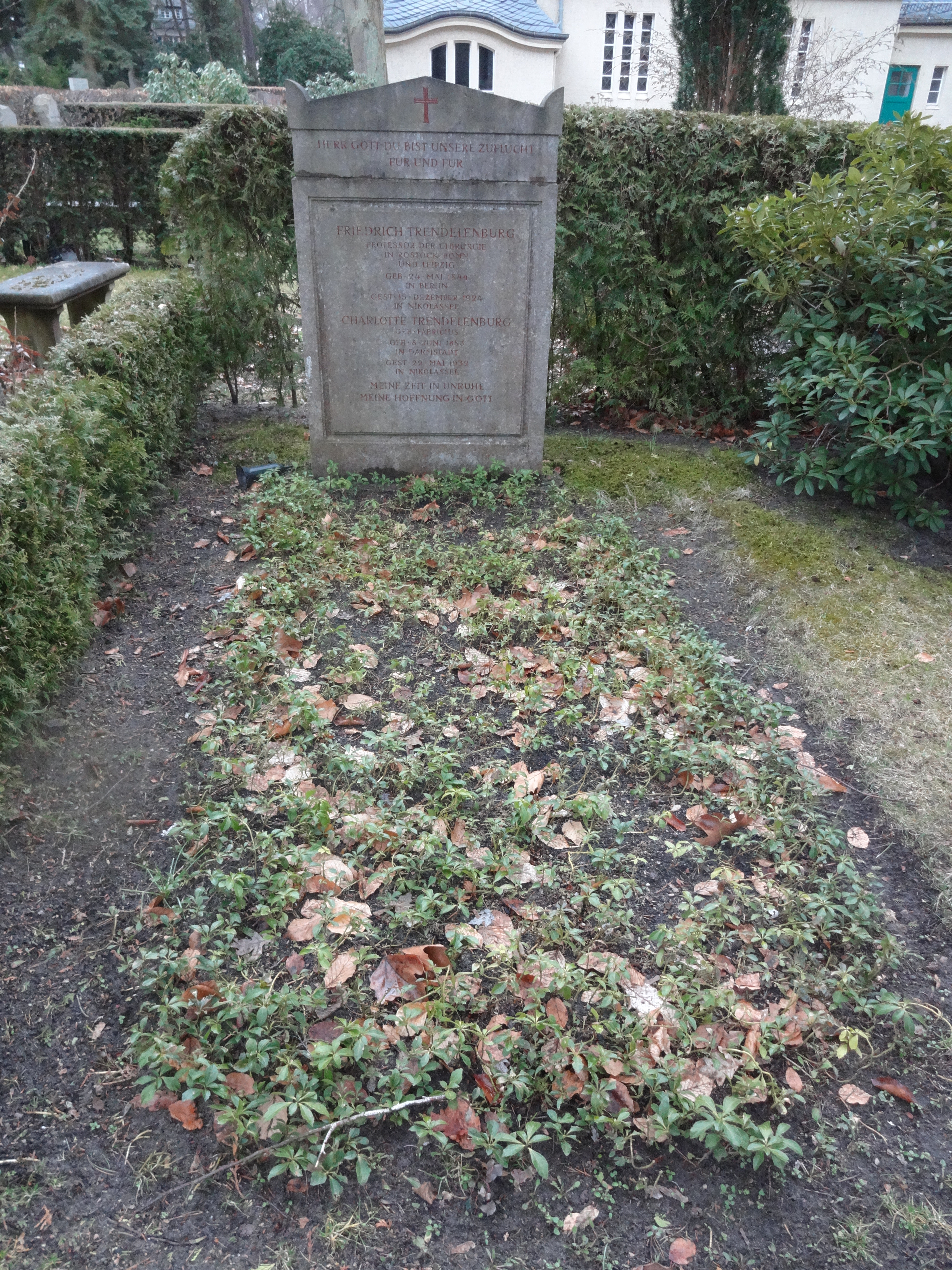 Grab von Prof. Friedrich Trendelenburg auf dem Evangelischen Kirchhof Nikolassee in Berlin